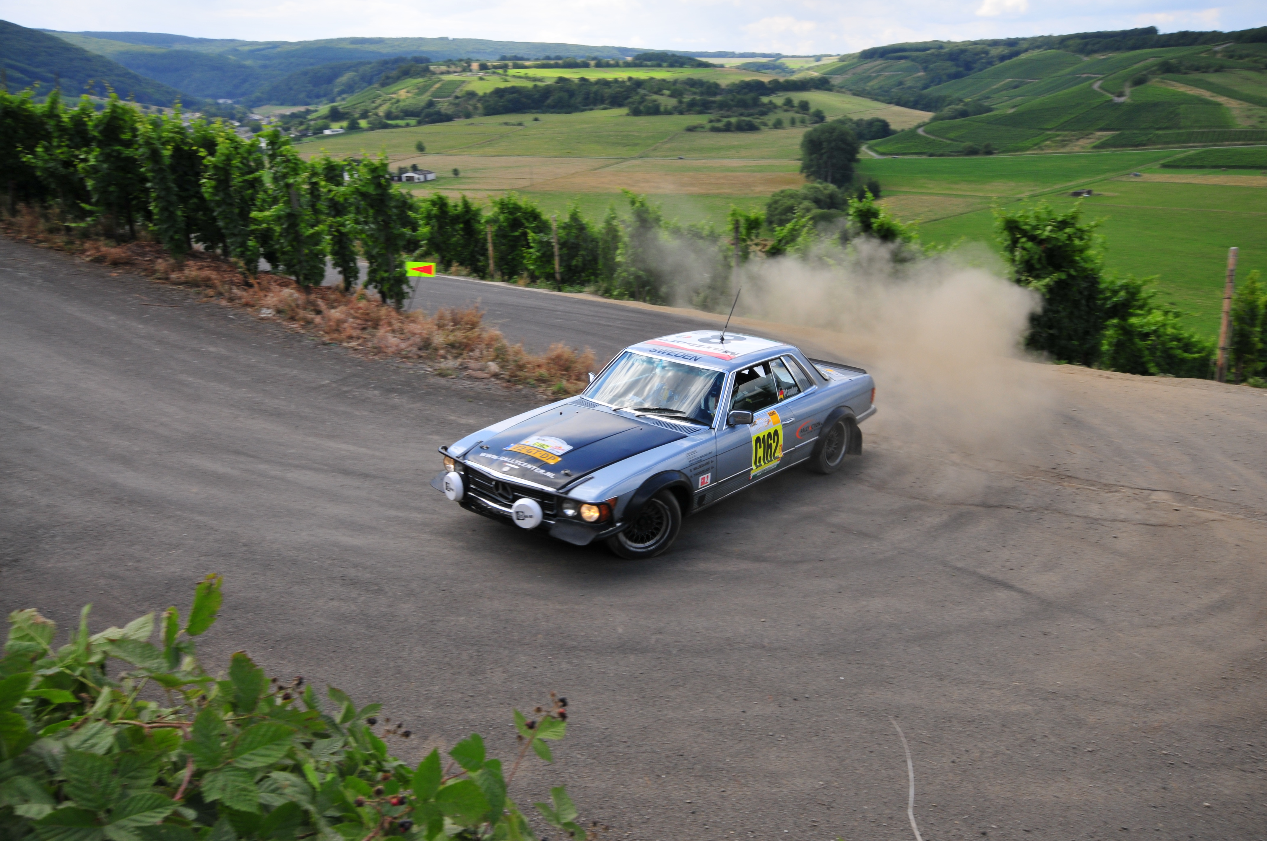 Björn Waldegård's Mercedes 450 SLC 5.0 driven during the 2008 Rallye Deutschland.